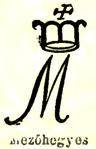 Mezőhegyesi lóbélyeg. Jó ménesből származó csikót tüzes vassal égetett ménesbélyeggel szokás ellátni